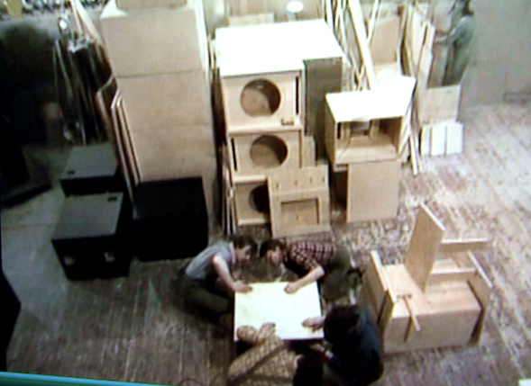 СПМ «Рекорд», ЦехЦех аккустических систем